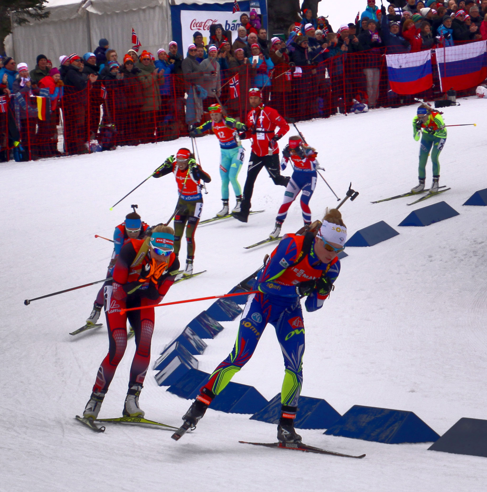 Oslo. Aux championnats du monde de biathlon.